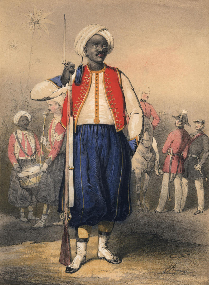 احد جنود فيلق الزواف